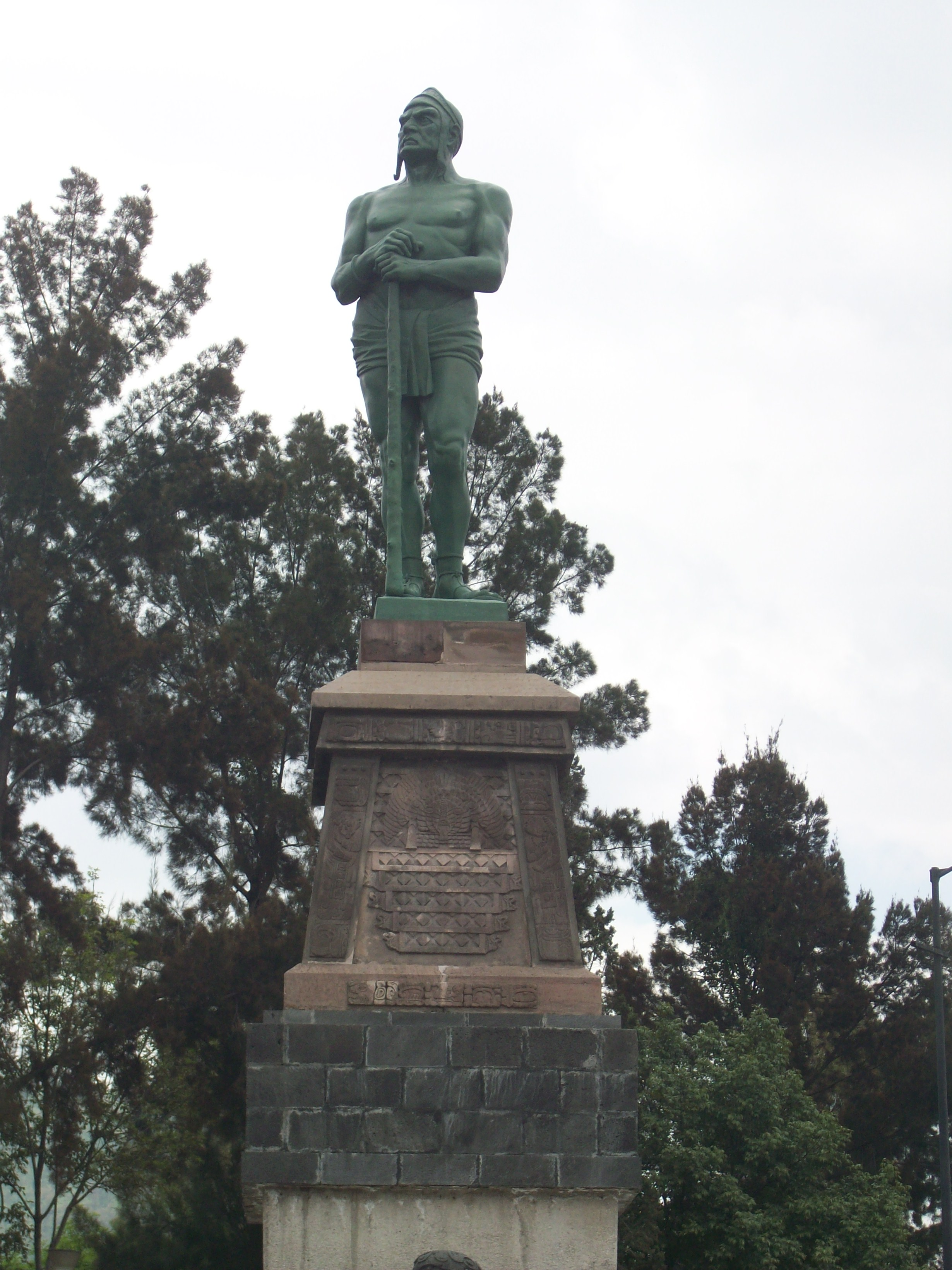 Estatua de Indios verdes en su basamento completo